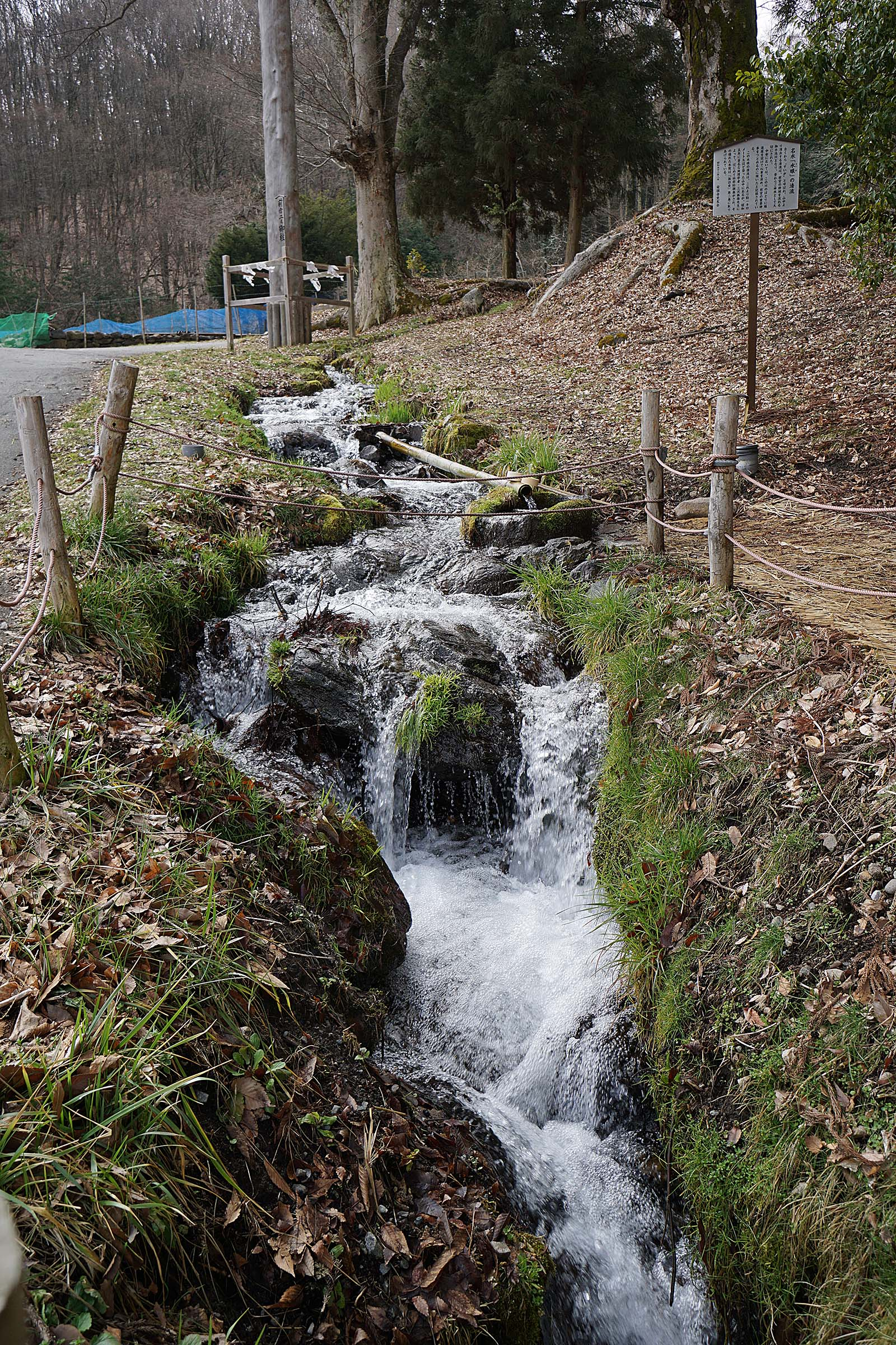 Suwa taisha Kamisha Maemiya , 諏訪大社 上社 前宮